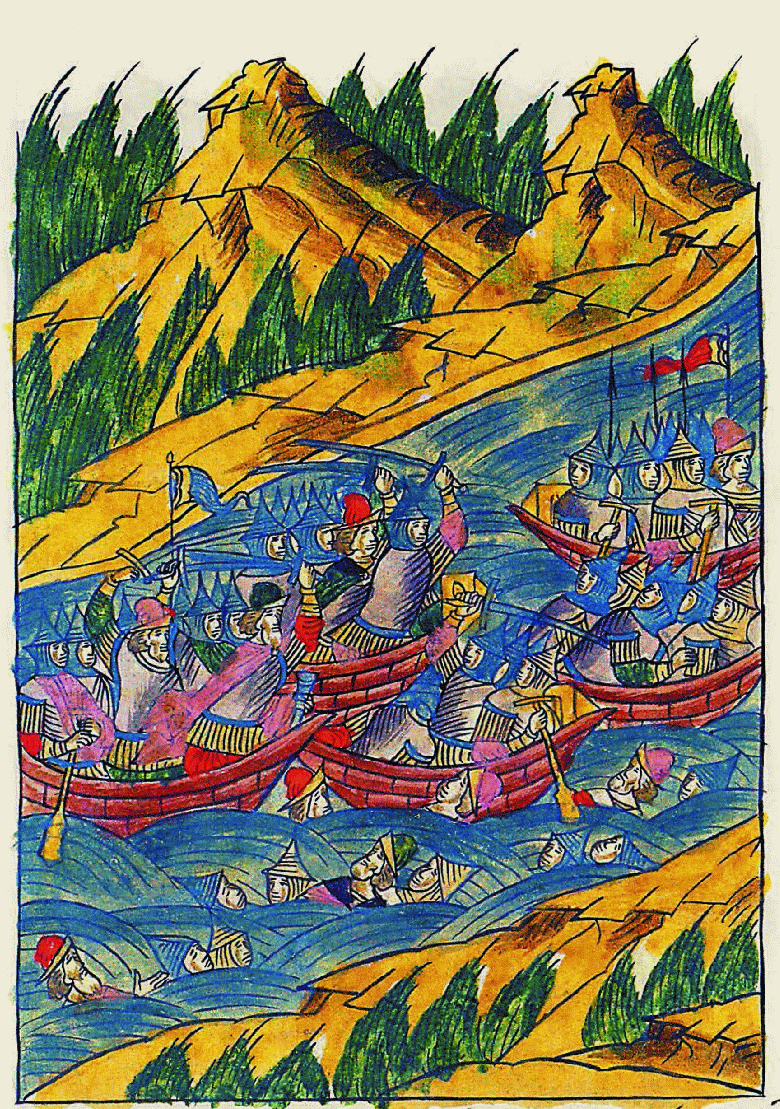 И после того князь Федор Семенович Хрипун, из Ряполов- ских князей, побил татар на Волге 4 июля.